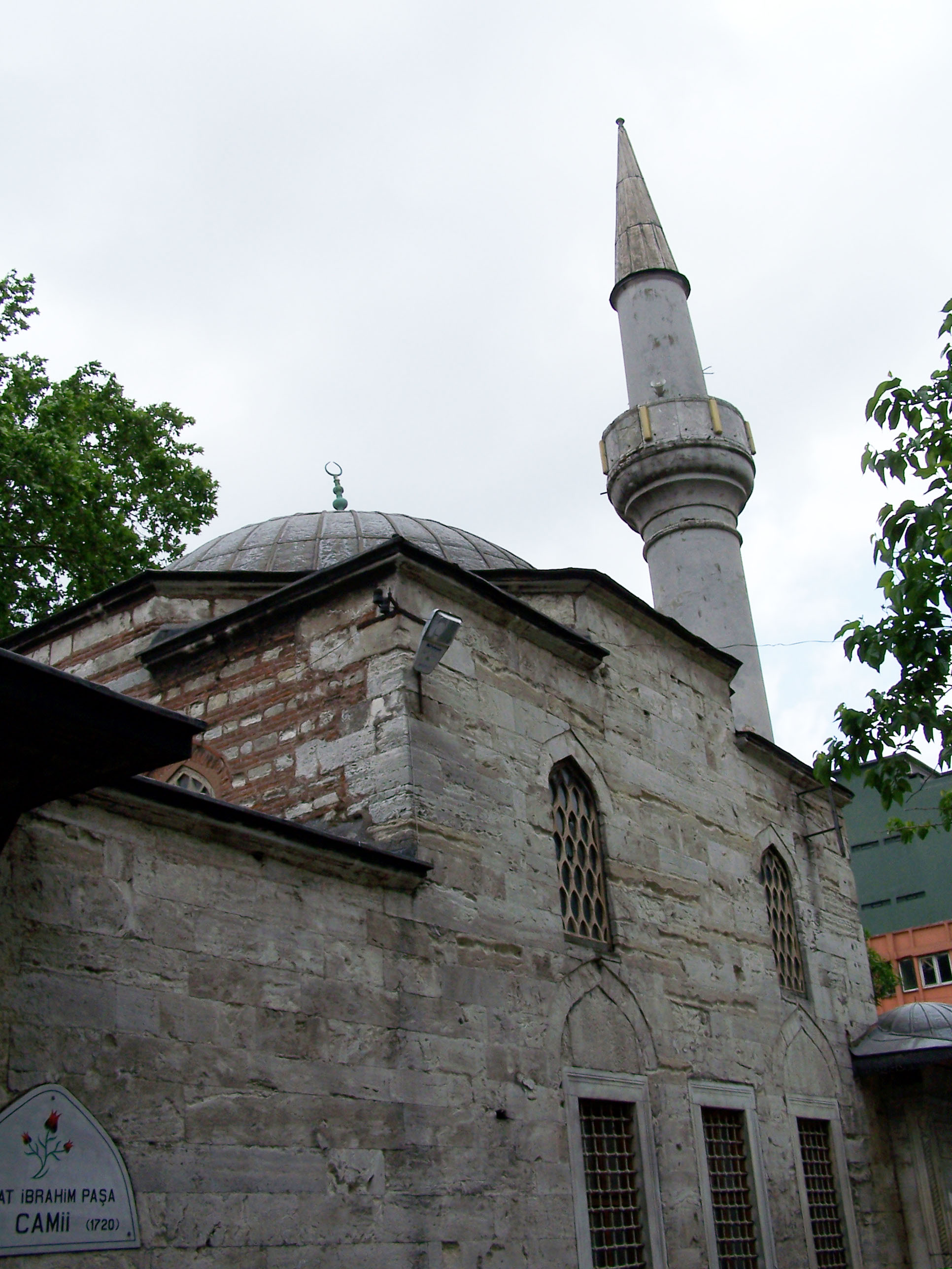 Damat İbrahim Paşa Camii in Fatih, İstanbul, Turkey